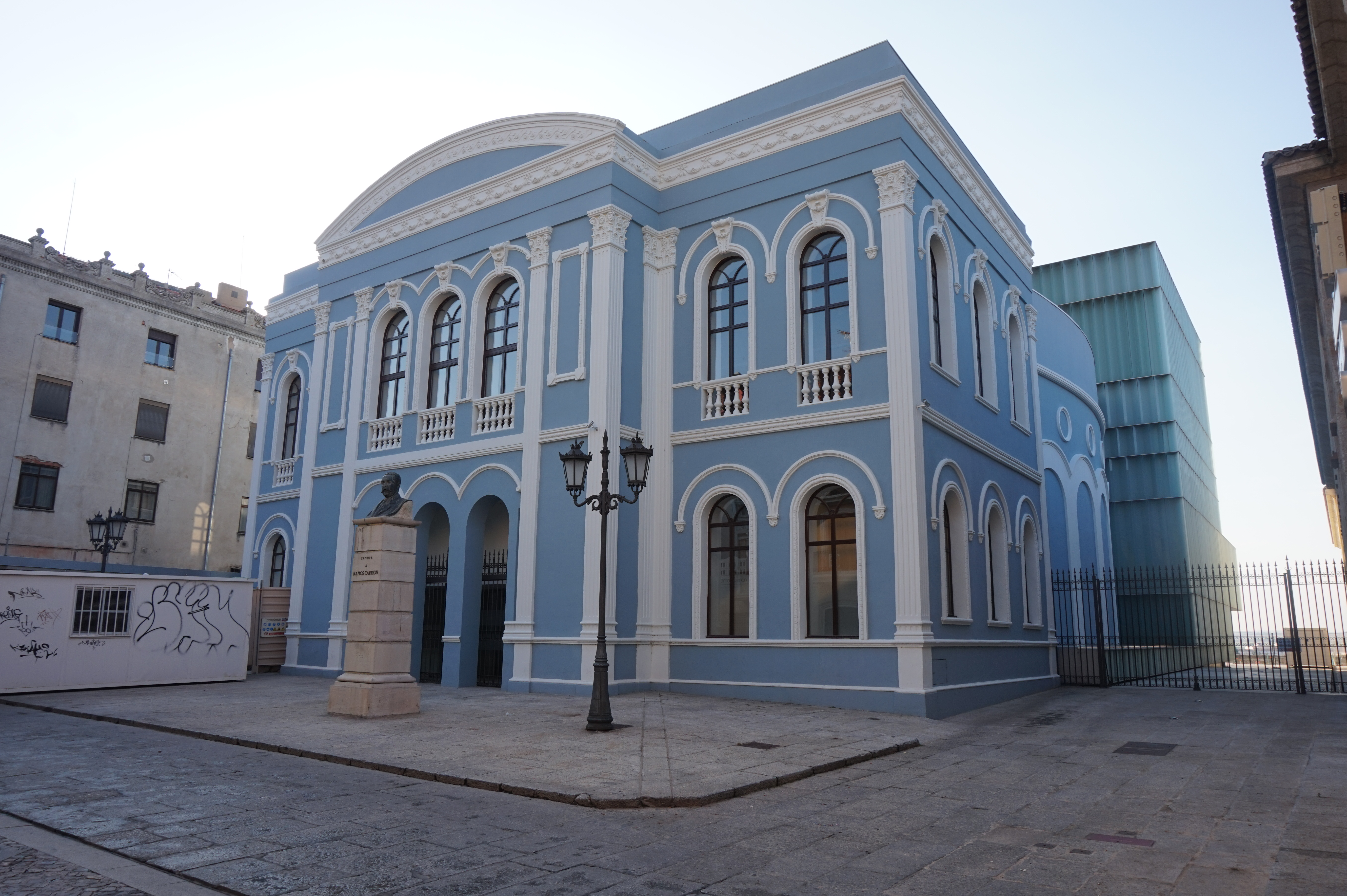 Teatro Ramos Carrión en 2015